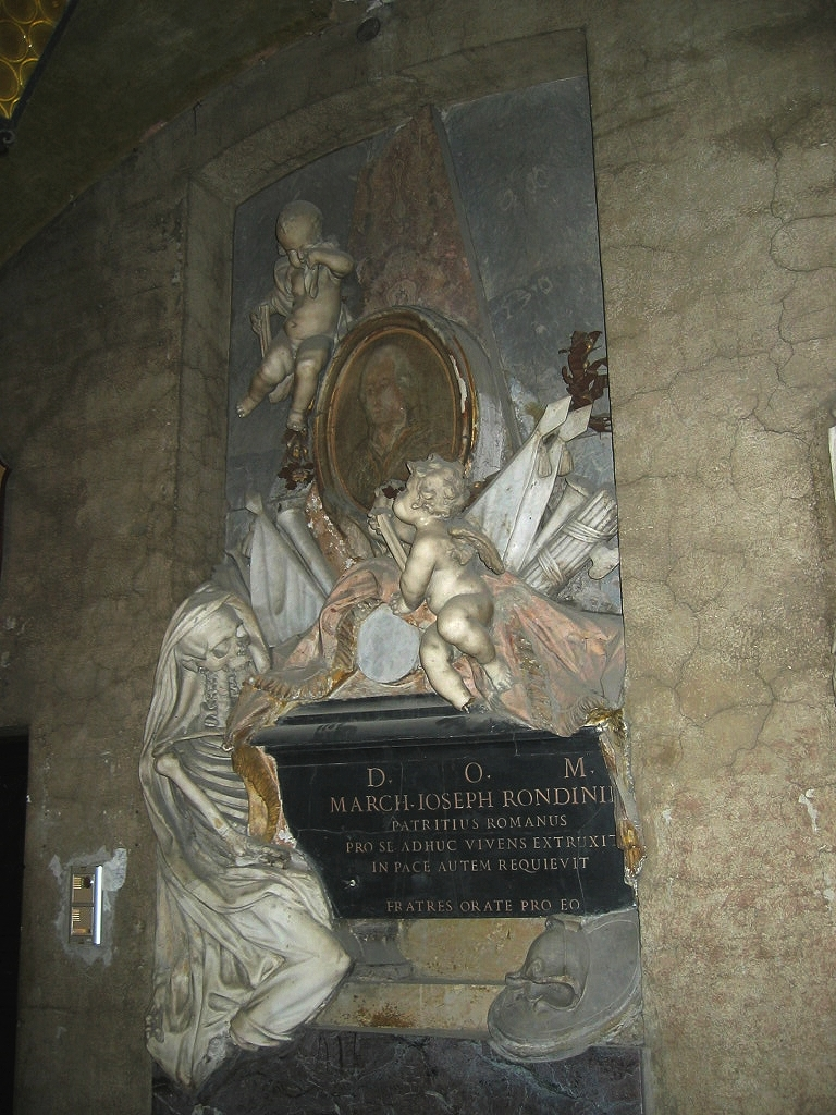 Monumento funebre del marchese Giuseppe Rondinini Atrio, Chiostro di Sant'Onofrio, Roma